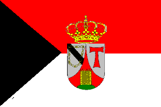 Bandera de Atalaya